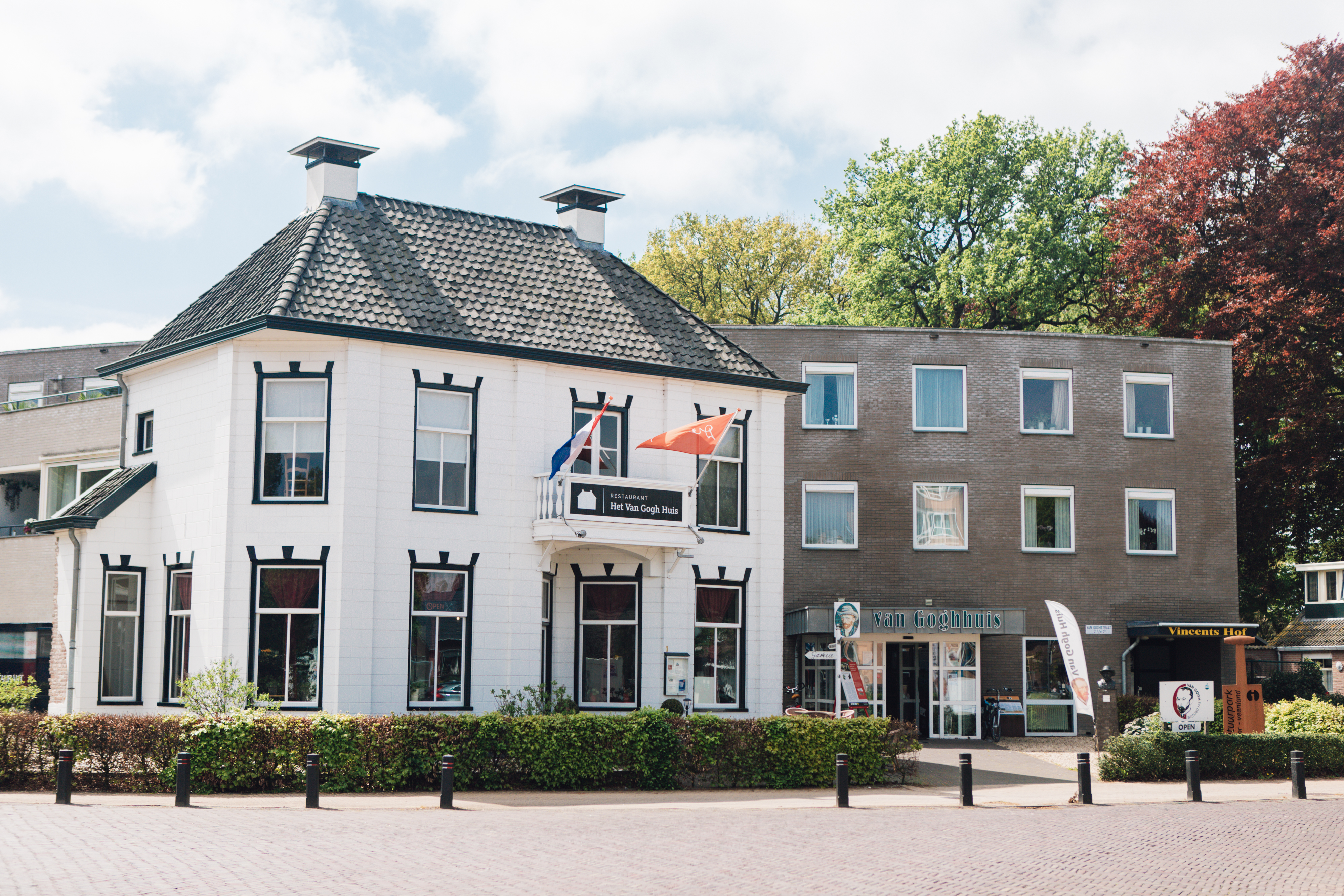 Van Gogh Huis in 2019